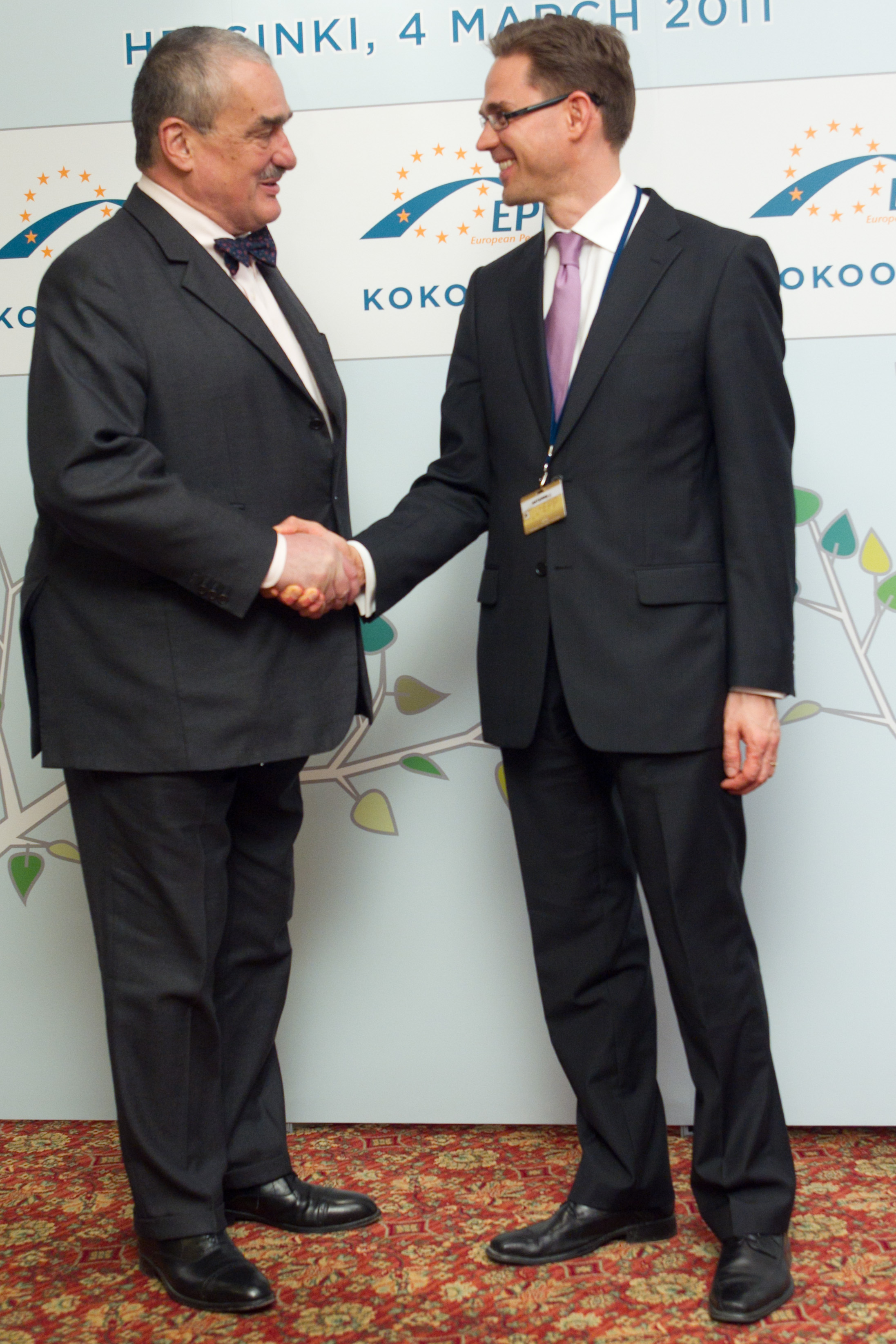 Karel Schwarzenberg and Jyrki Katainen. Photo: Mauri Ratilainen / Compic